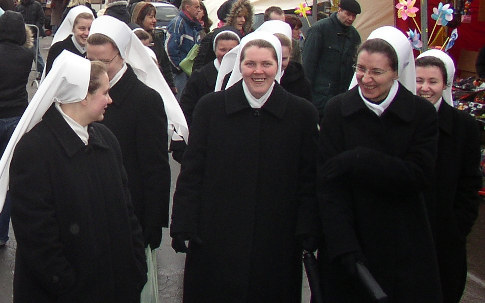 Kraków - Emaus 2008 - festival 4